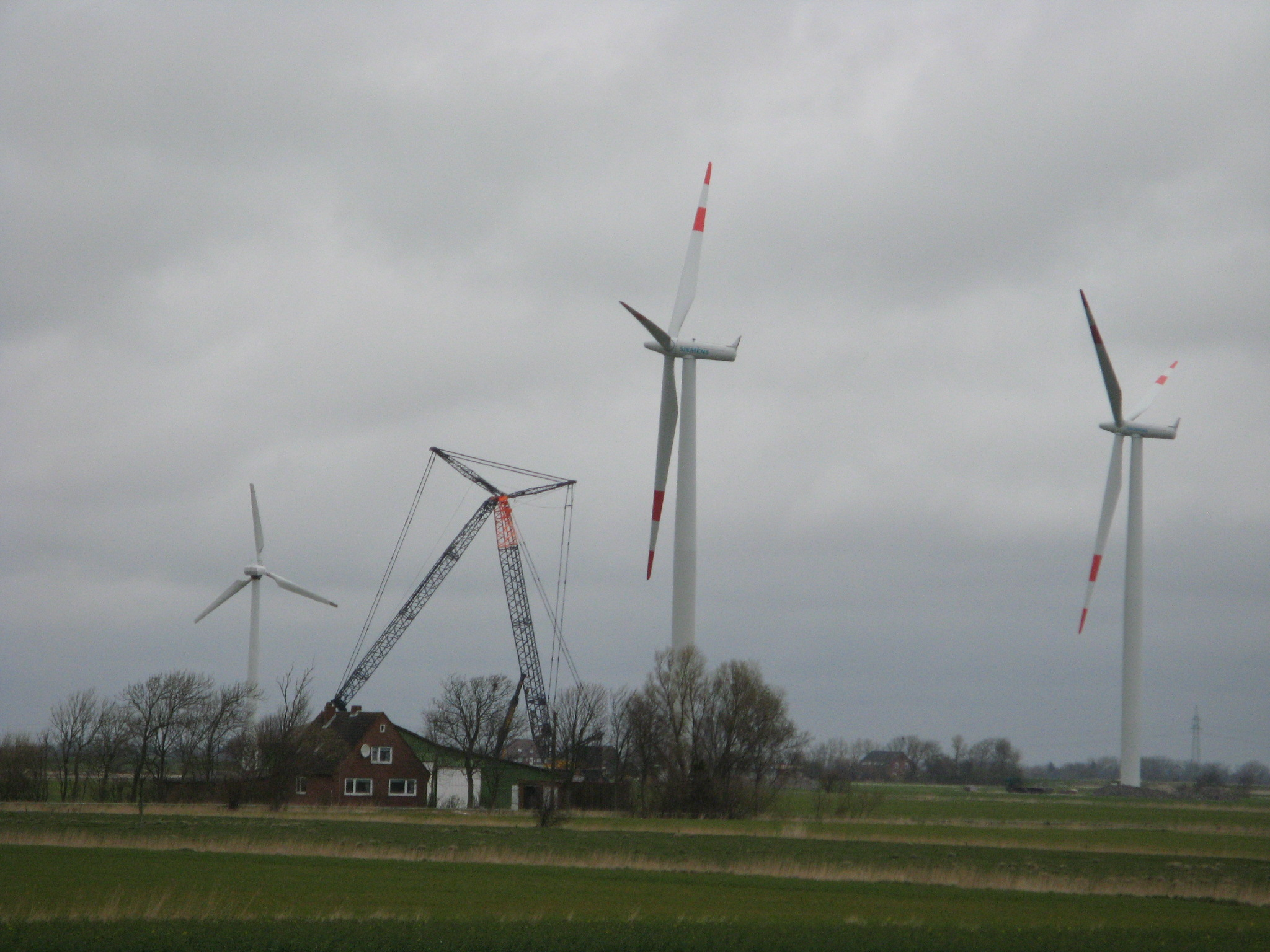 Wind turbines in Galmsbüll Author: Dirk Ingo Franke